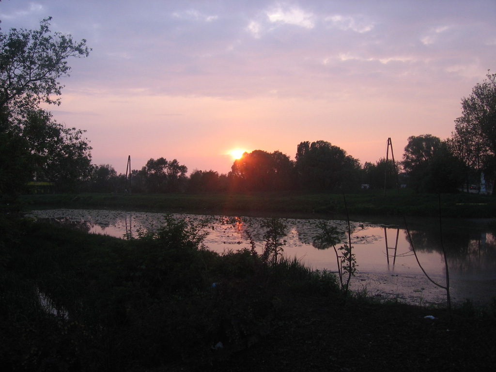 Zachód słońca nad Św. Janem - odnogą Jeziorki powstałą dzięki spiętrzeniu wody na Imberfalu. Widok od strony ronda JP2 w kierunku północno-zachodnim. Śluza przemysłowa widoczna na lewym krańcu zdjęcia.